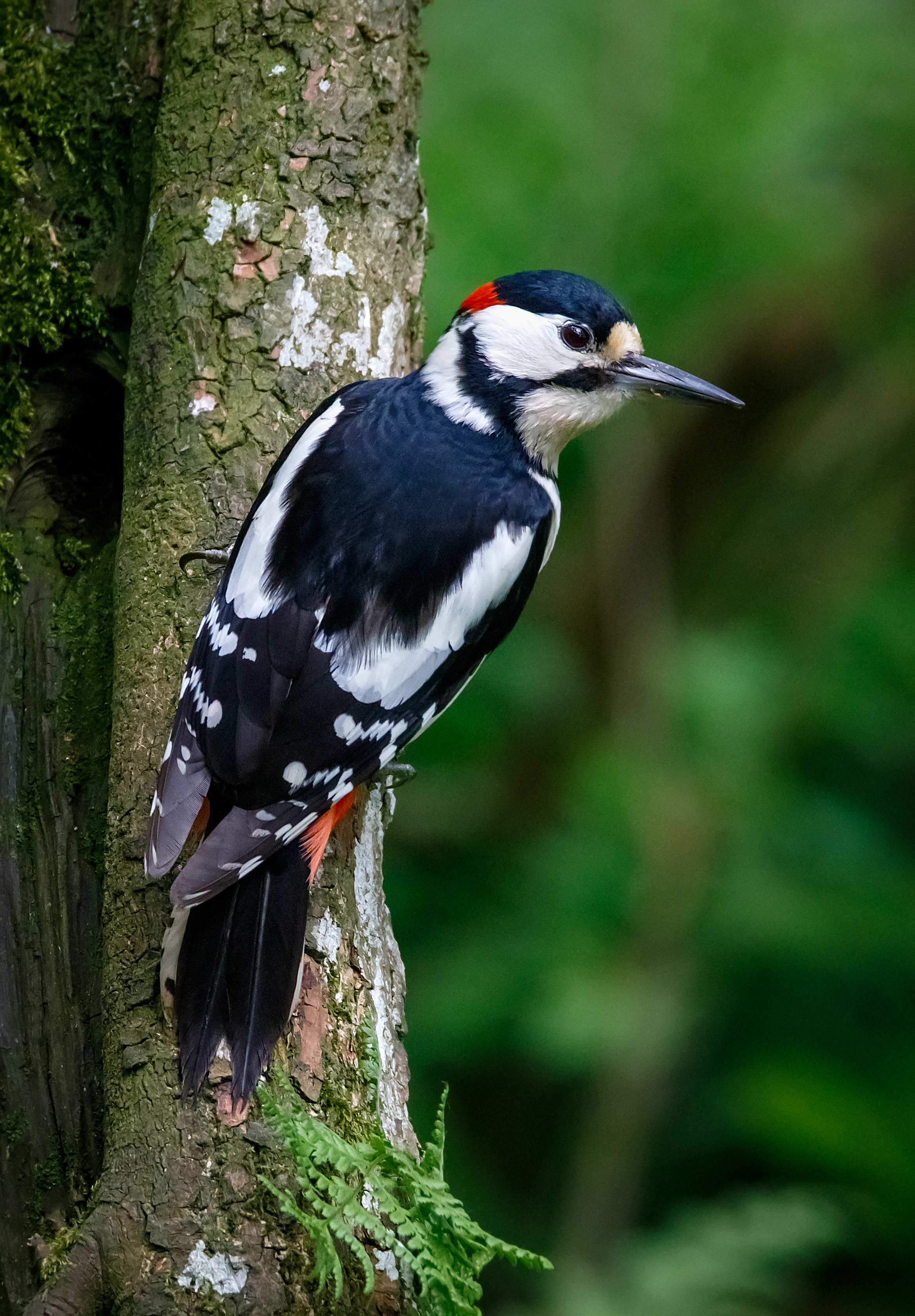 At Eskrigg nature reserve, Lockerbie, Scotland.